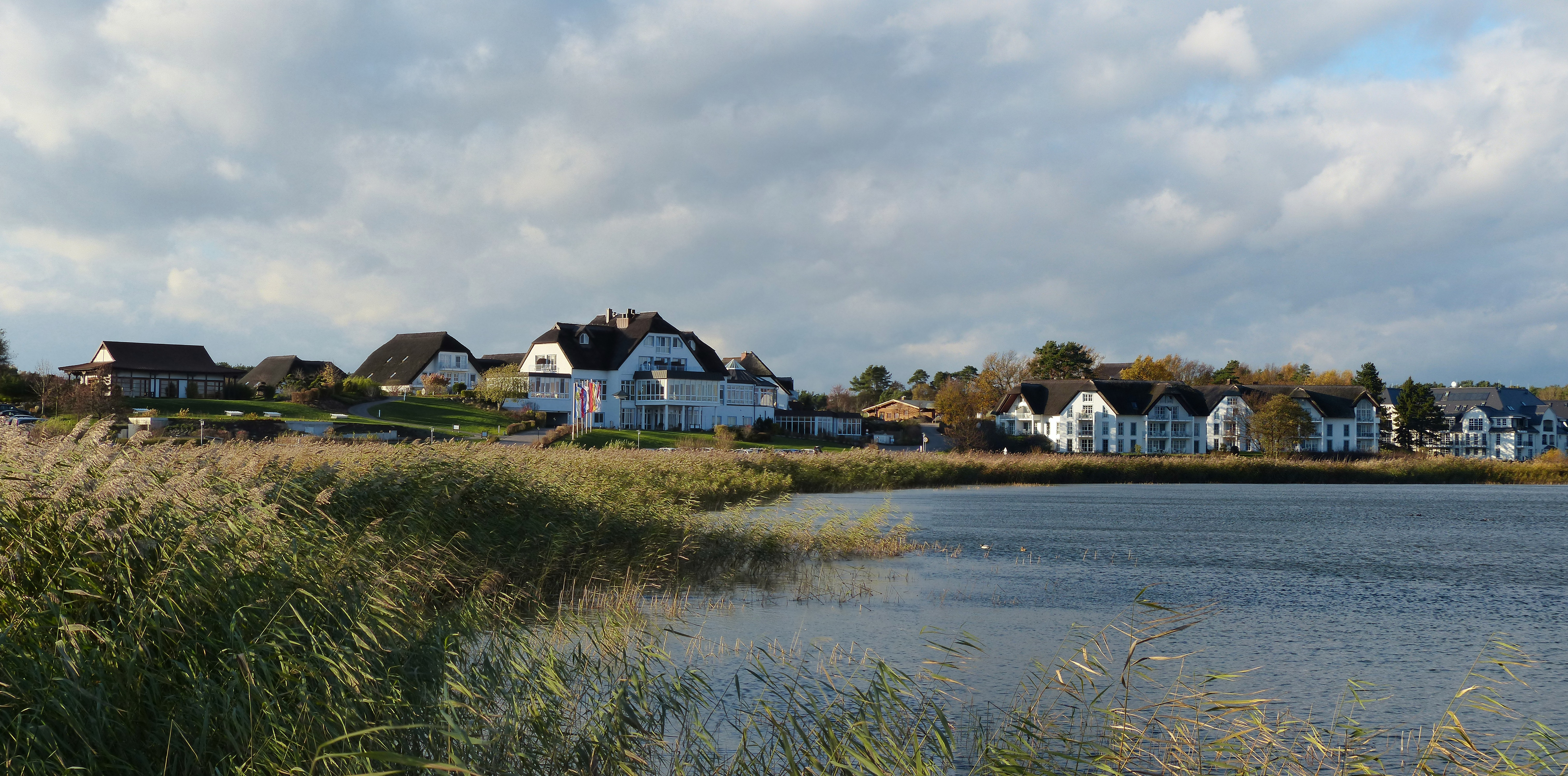 Westufer des Balmer Sees, Golfanlage mit Hotel